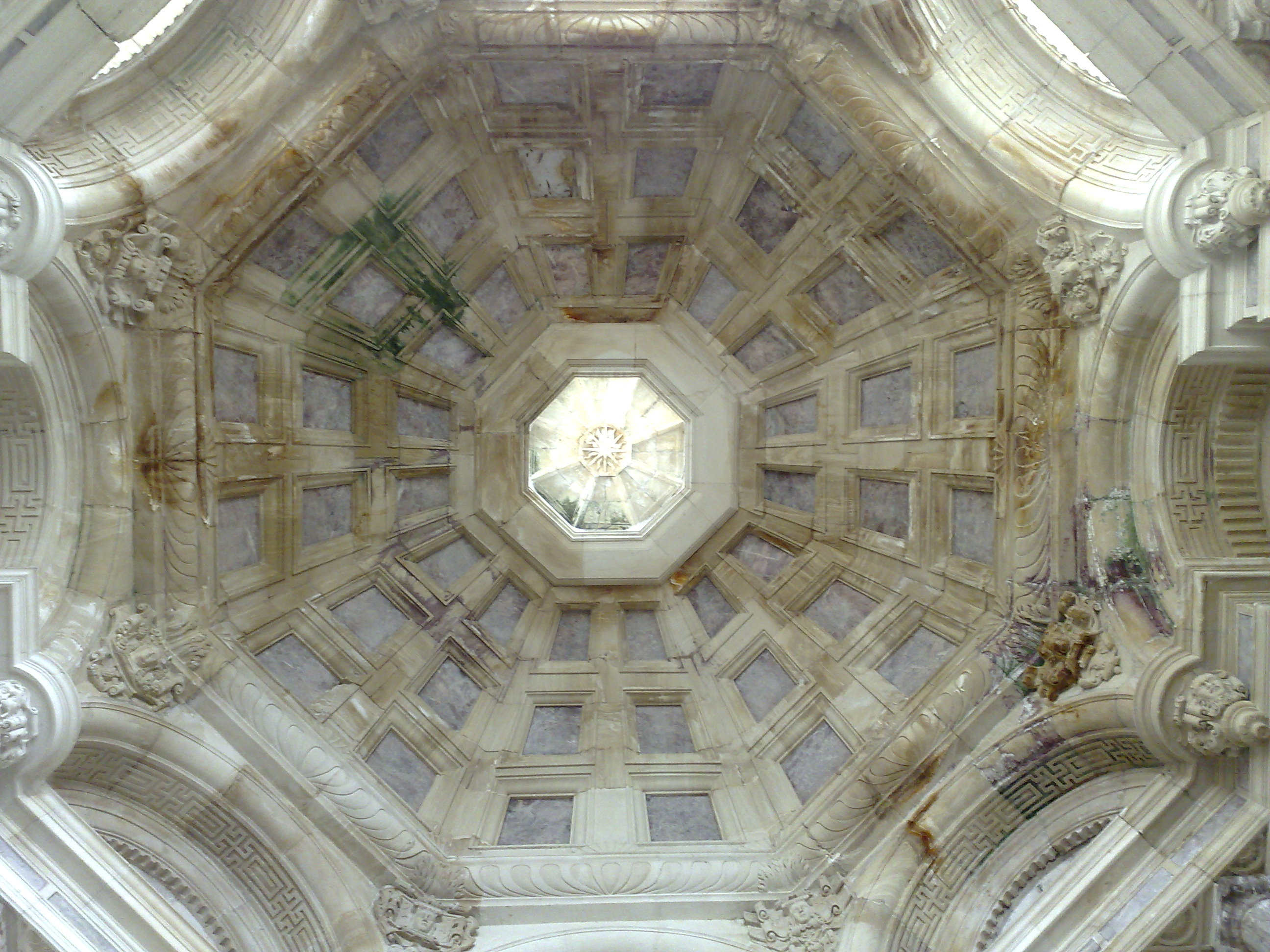 plafond à caissons Renaissance, chapelle Jean Forget de la cathédrale de Toul.